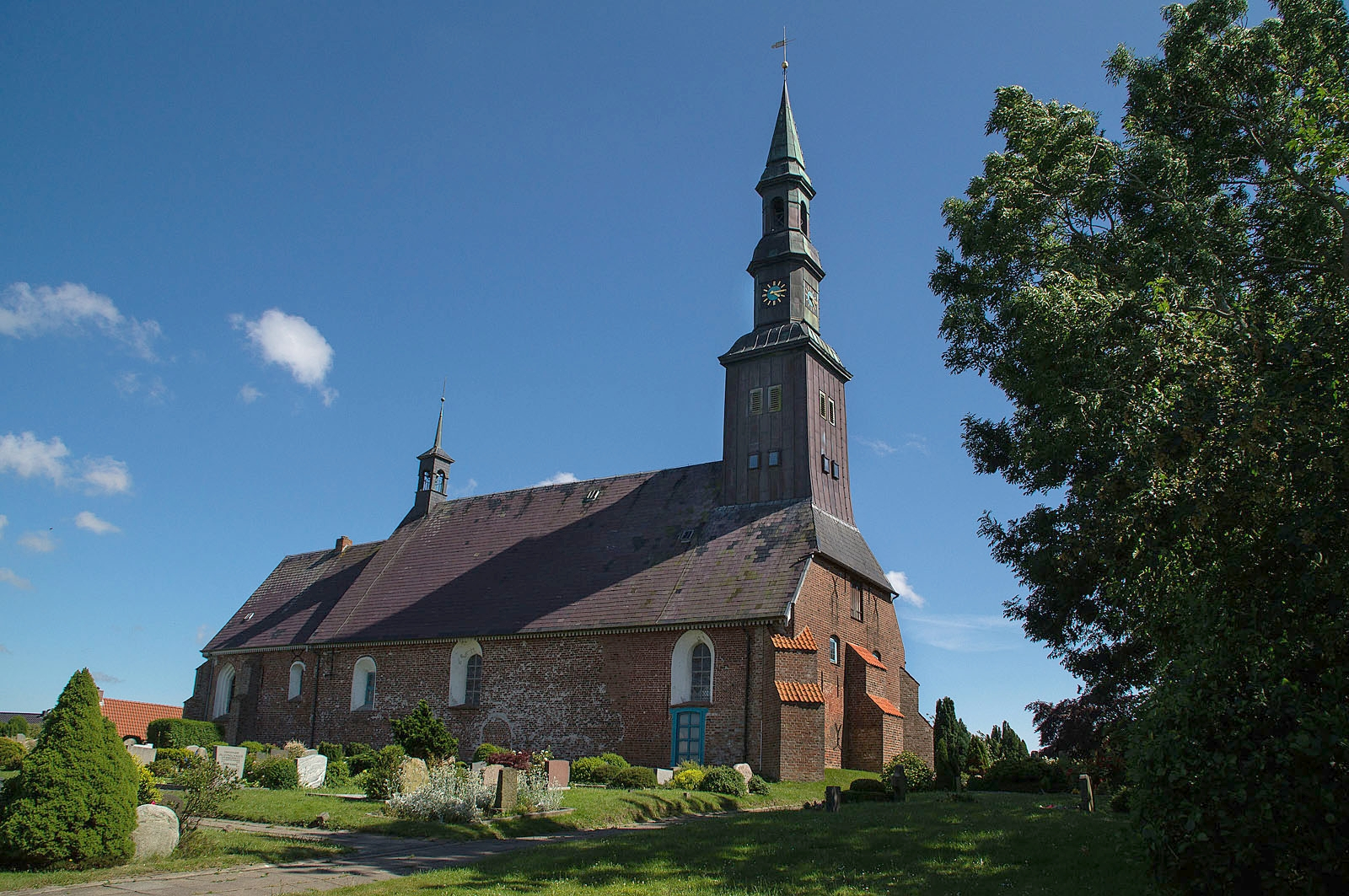 Ansicht von Nordwest